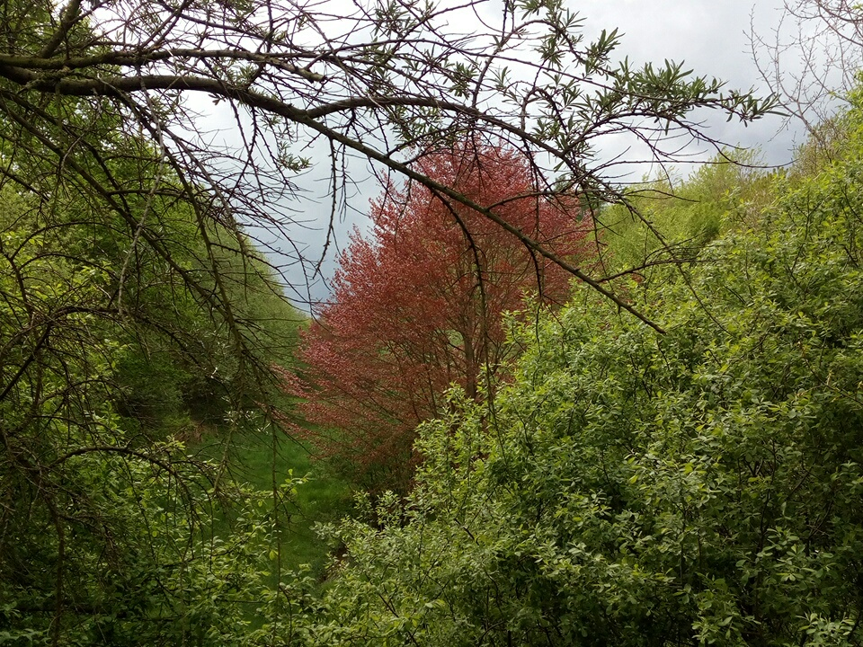 Ein durch die Hauptstraße zweigeteiltes Wald-Naturschutzgebiet in Melle-Buer. Auf einer Seite grenzt es an eine Koppel und Sportplätze.